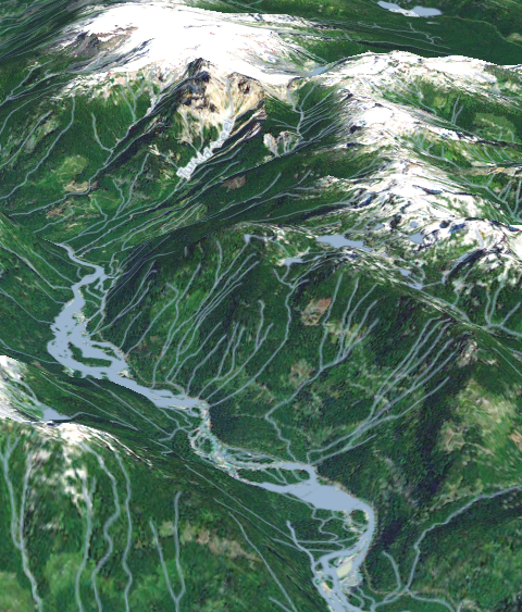 La Squamish et son système hydrographique, au Canada, vue du sud.